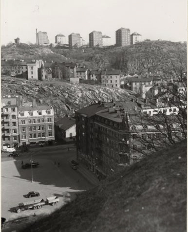 Skanstorget, Nilsson Berg och Södra Guldheden, Göteborg as seen from the fortress Skansen Kronan.